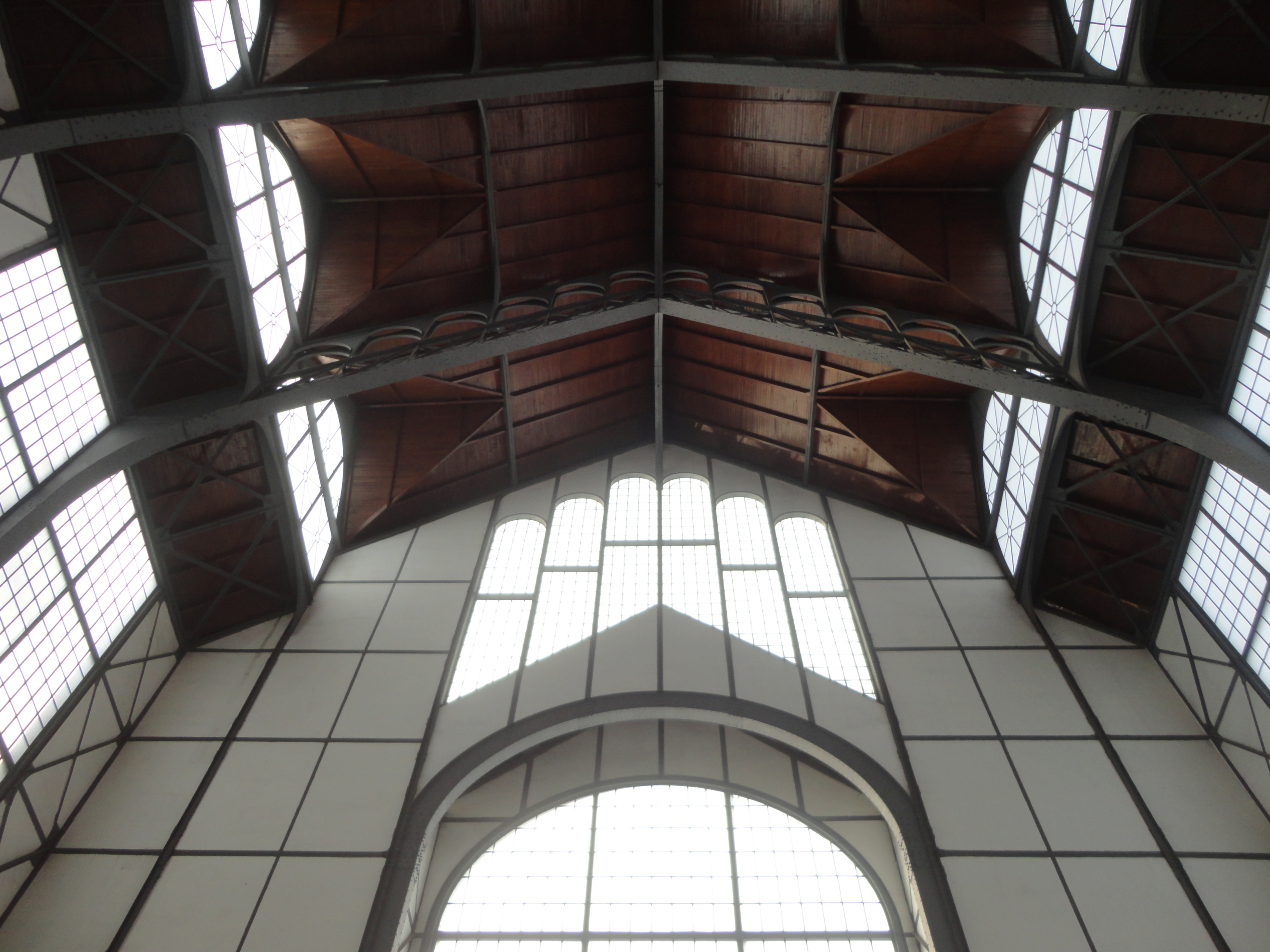 Museo Universitario del Chopo, Ciudad de México.